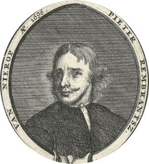 Portret van Pieter Rembrantsz van Nierop (1640?-1708), detail van het titelblad van de Verbeterde en vermeerderde Nieroper Schat-kamer